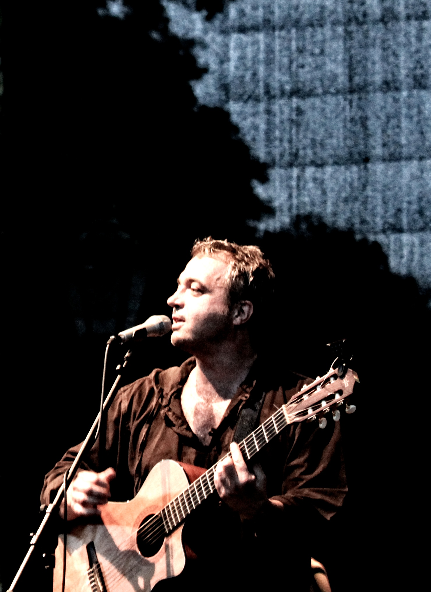 Götz Widmann